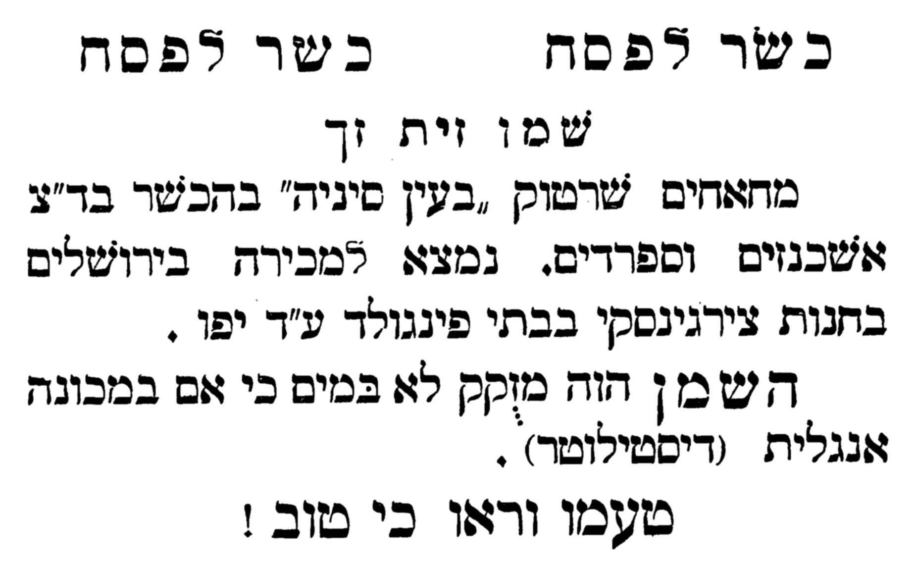 מודעת פרסומת למוצרי השמן של יעקב שרתוק בעין סיניא